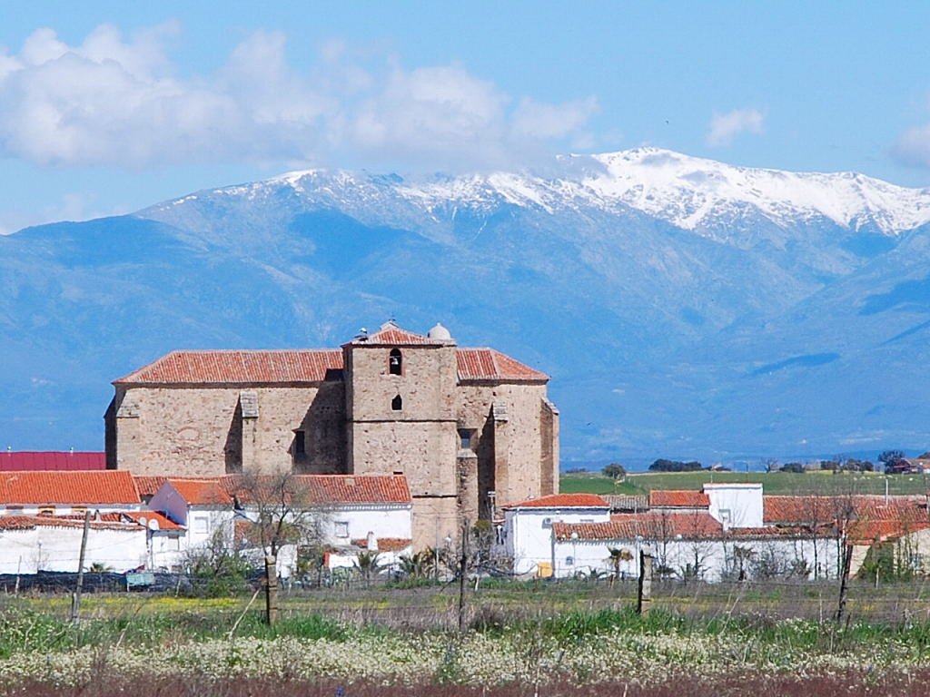 Iglesia San Juan Bautista (sigl. XVI) de Saucedilla (Cáceres)